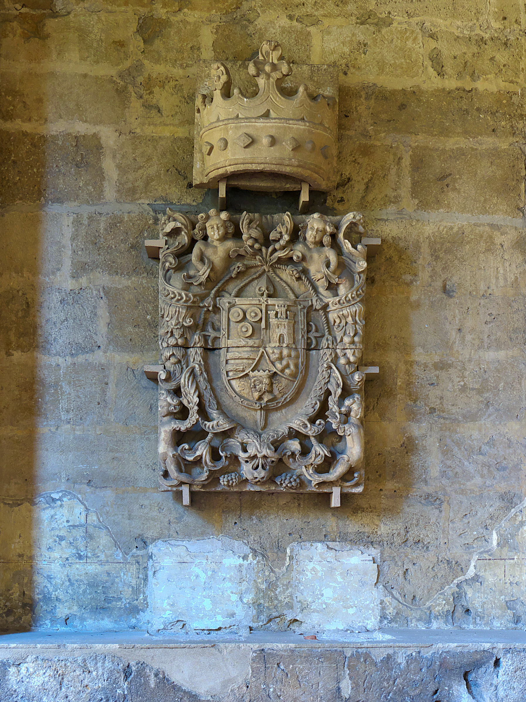 Claustro del Convento de San Marcos (León). Escudo tallado en piedra (s. XVIII)